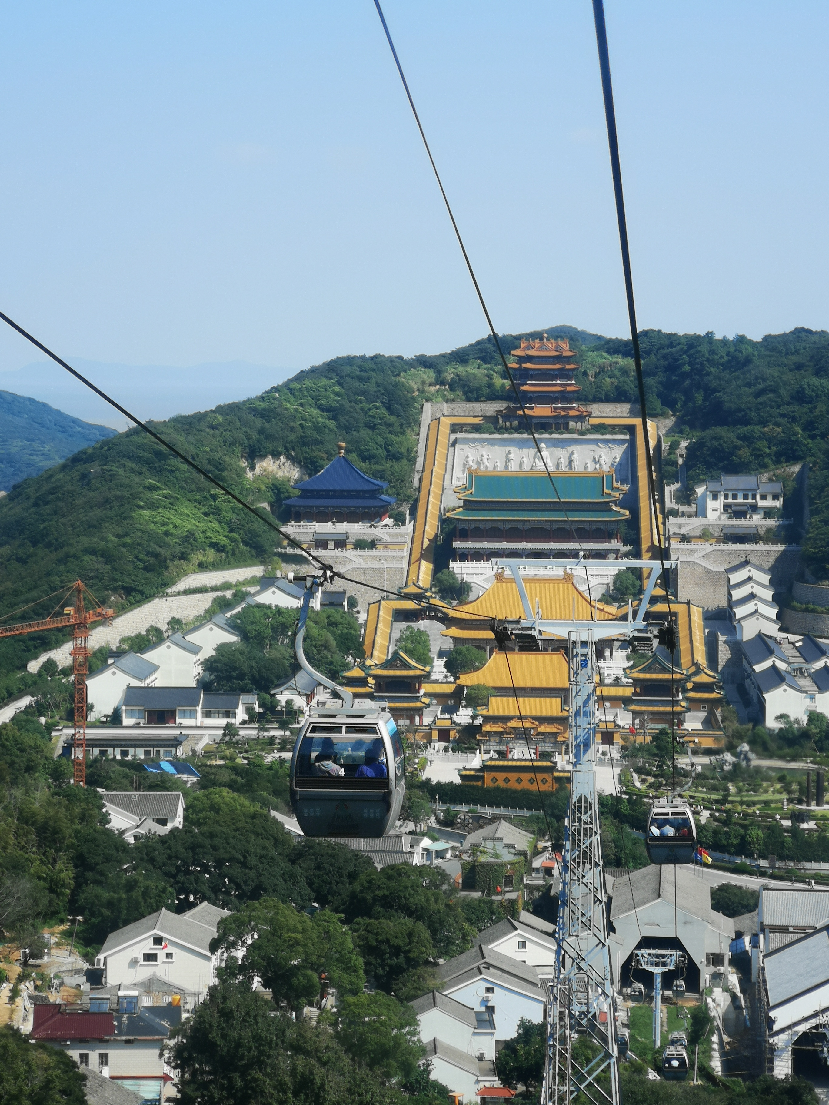 中文（中国大陆）: 普陀山第四寺宝陀讲寺，全景俯瞰（索道视角）